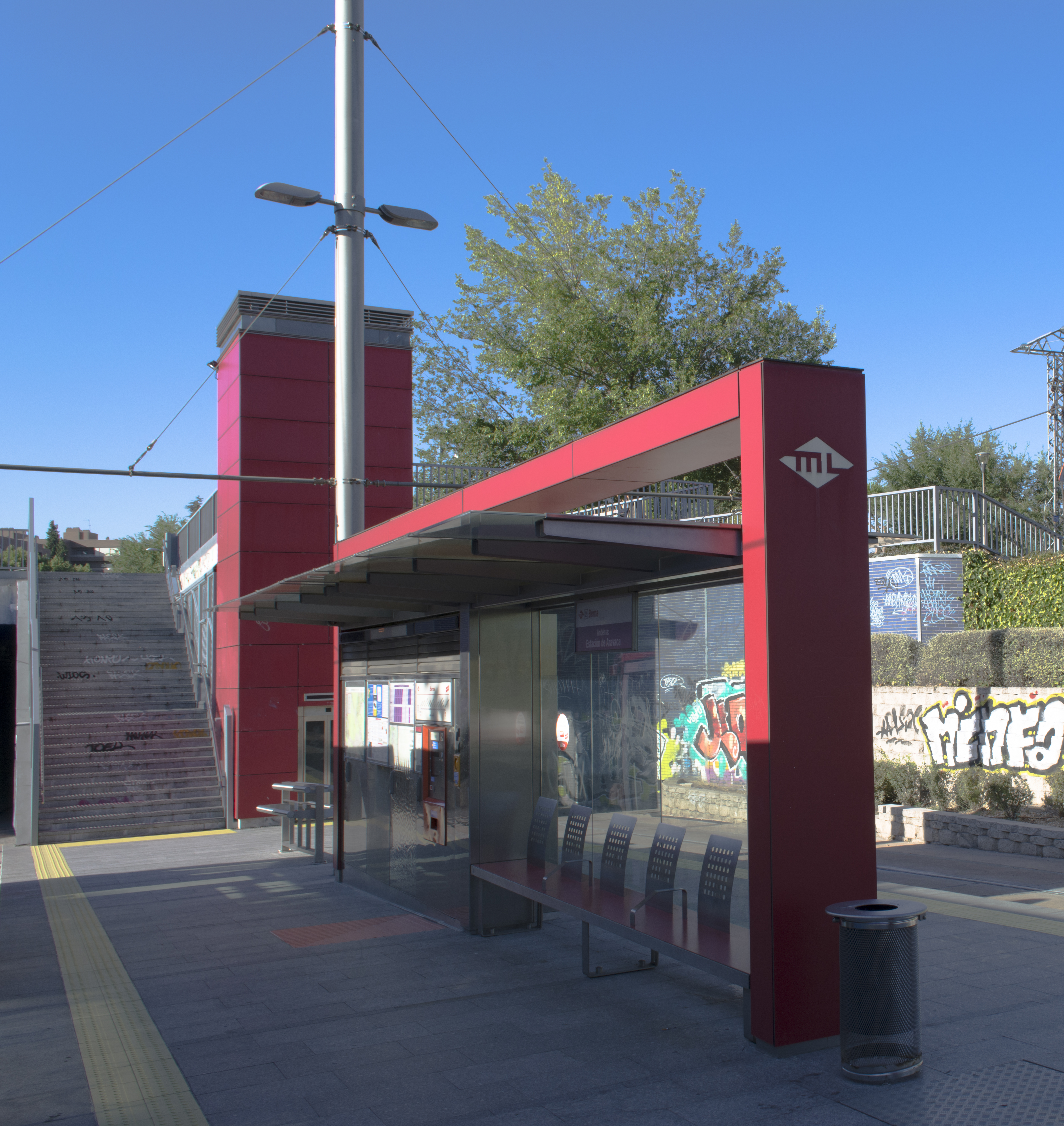 Acceso y andén de la estación Berna. Aunque exterior, la entrada se realiza desde unas escaleras situadas en la rotonda de la Avenida Comunidad de Madrid con Avenida Europa, en un punto más elevado.